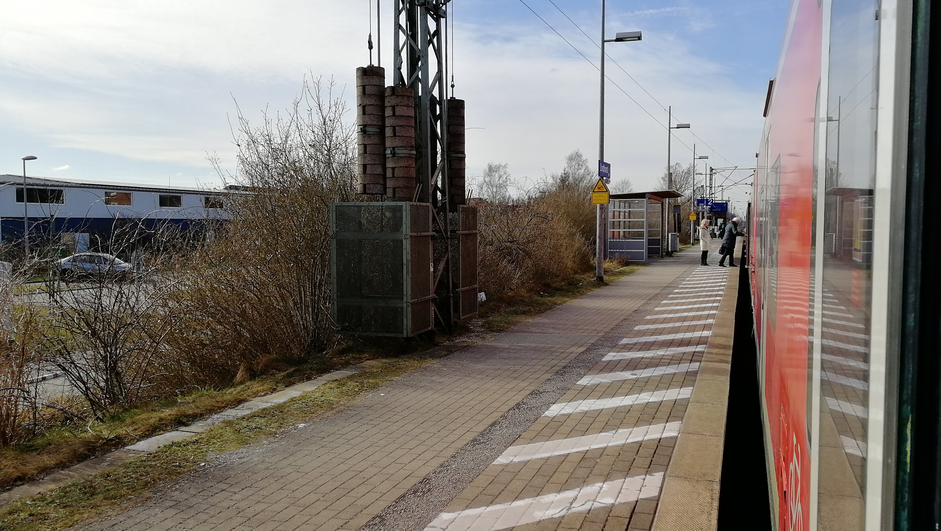 S-Bahn Hannover, Bahnhof Lindhorst. Bahnsteig Richtung Hannover